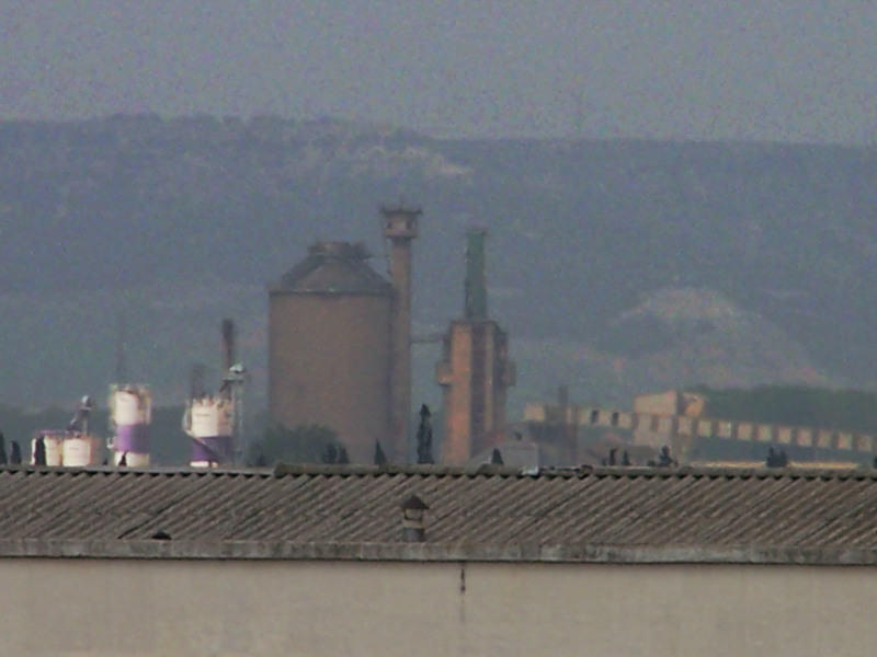 Pues si, desde la facultad de medicina se puede ver la fábrica de Nicas, que unos corruptos cerraron. La foto está hecha desde la facultad de medicina, desde una zona de escaleras a la que más o menos se accede así: entras por la puerta principal y tiras hacia la derecha, metiéndote por el pasillo que está al lado del aula magna, giras a la derecha, después, a la izquierda, y al fondo hay unas escaleras medioabandonadas, pues sube esas escaleras (no se si los ascensores llegan a funcionar) y en la parte superior, ahí hice la foto, si te encuentras un mechero en ese lugar entre tantas y tantas cosas, ten fé en que es de Jésús de Nazaret. El edificio en primer plano es la facultad de ciencias.